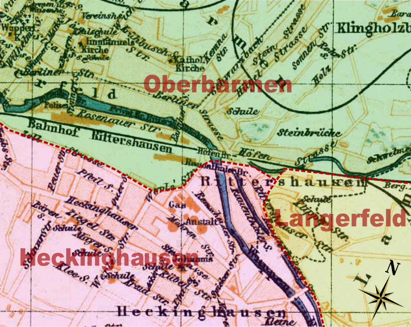 Karte Ritterhausens um 1900 mit den Grenzen des Stadtbezirk nach 1975